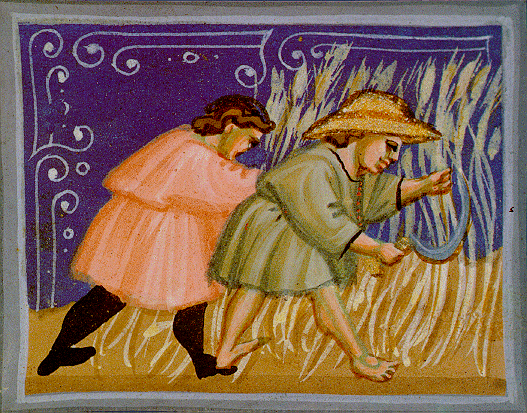 Miniatura do Missal antigo de Lorvão representando a ceifa do mês de junho.